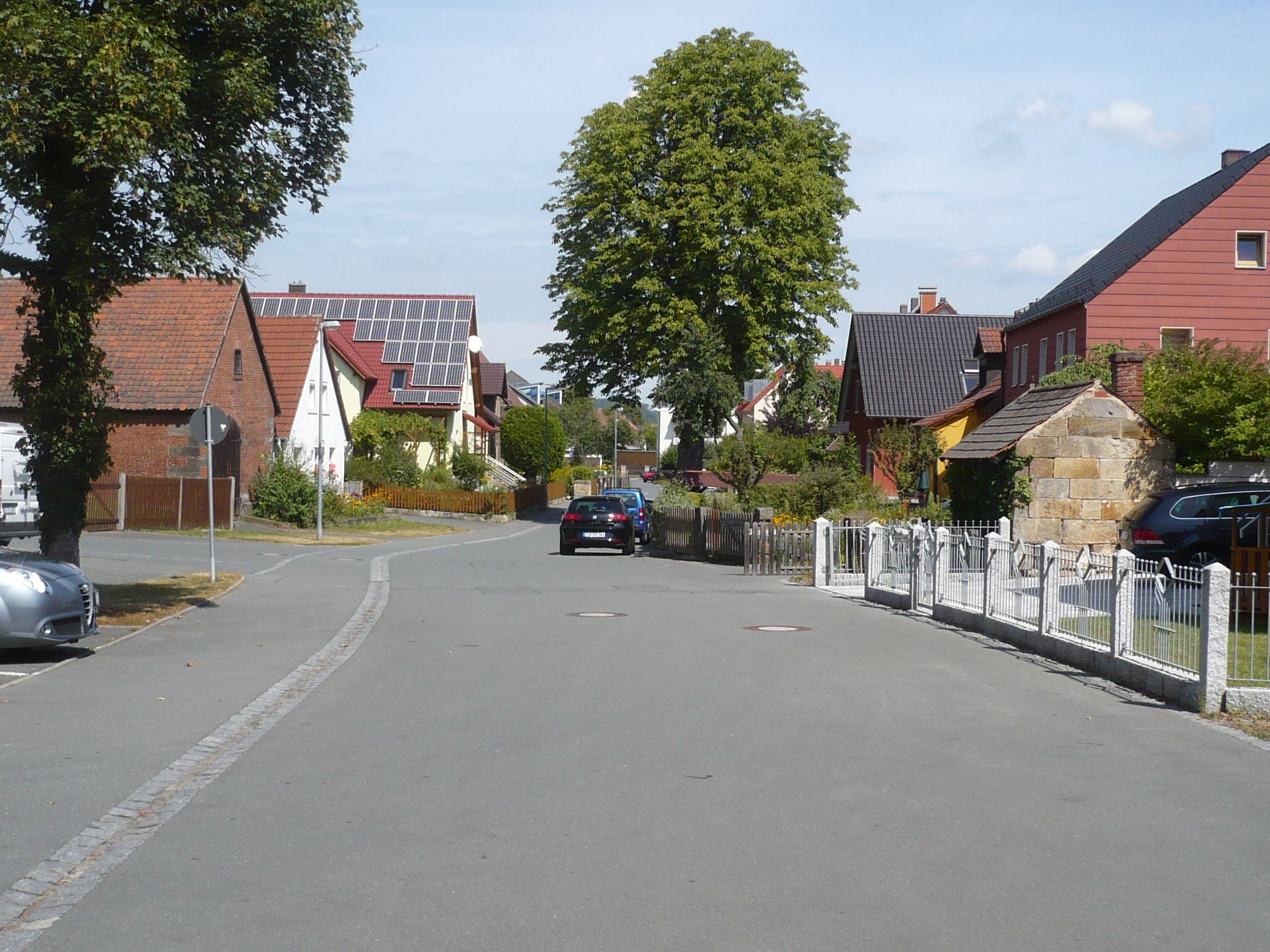 Wallstraße Bayreuth